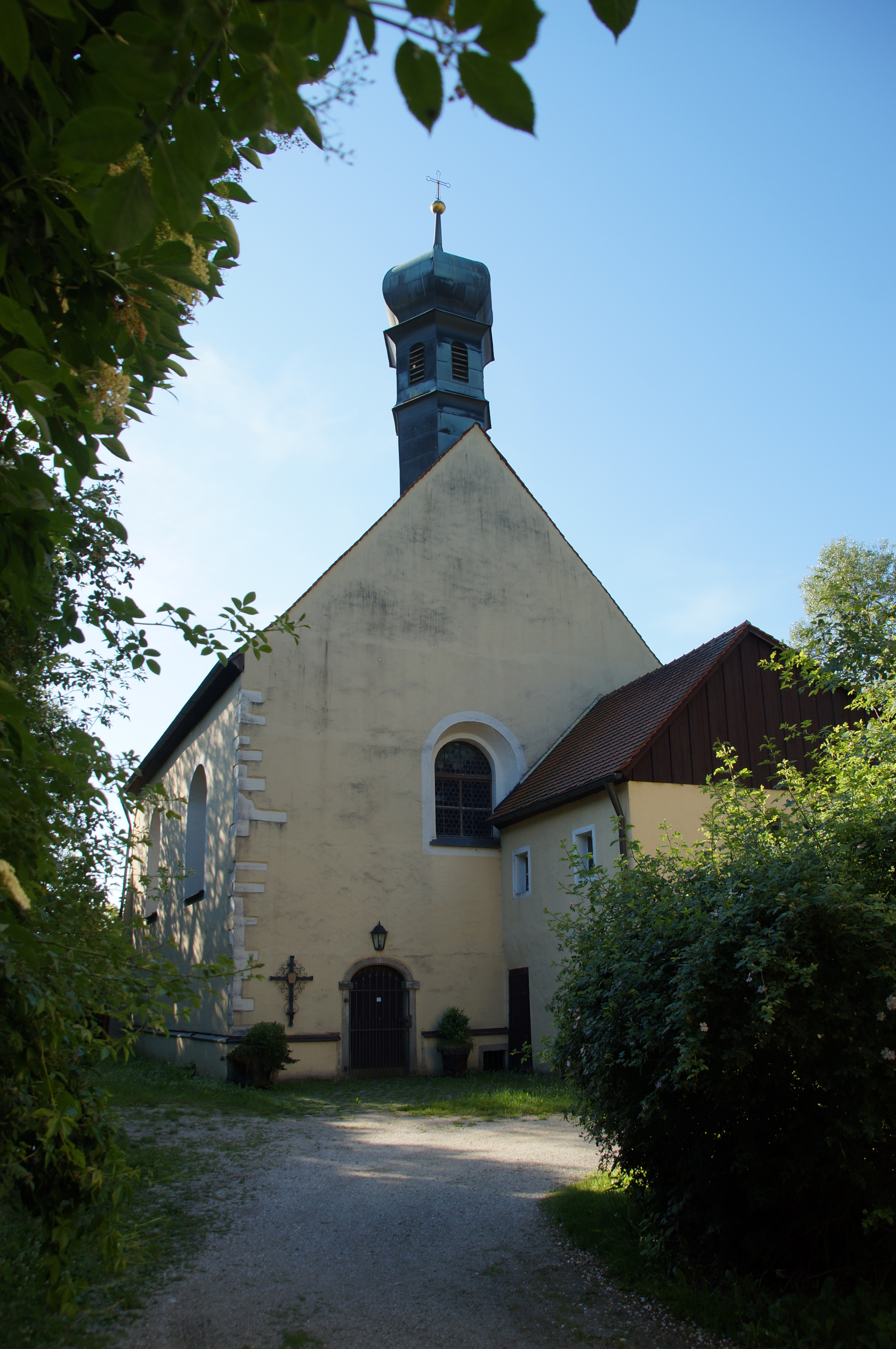 Ehemalige Burg, Burgstall, wohl 12. Jahrhundert, nach dem Dreißigjährigen Krieg verfallen; Katholische Nebenkirche und ehemalige Burgkapelle St. Michael, Saalbau mit rechteckigem Chor und Zwiebeldachreiter, 14. Jahrhundert, unter Einbeziehung von Teilen der der Ringmauer, 1689 umgebaut; mit Ausstattung